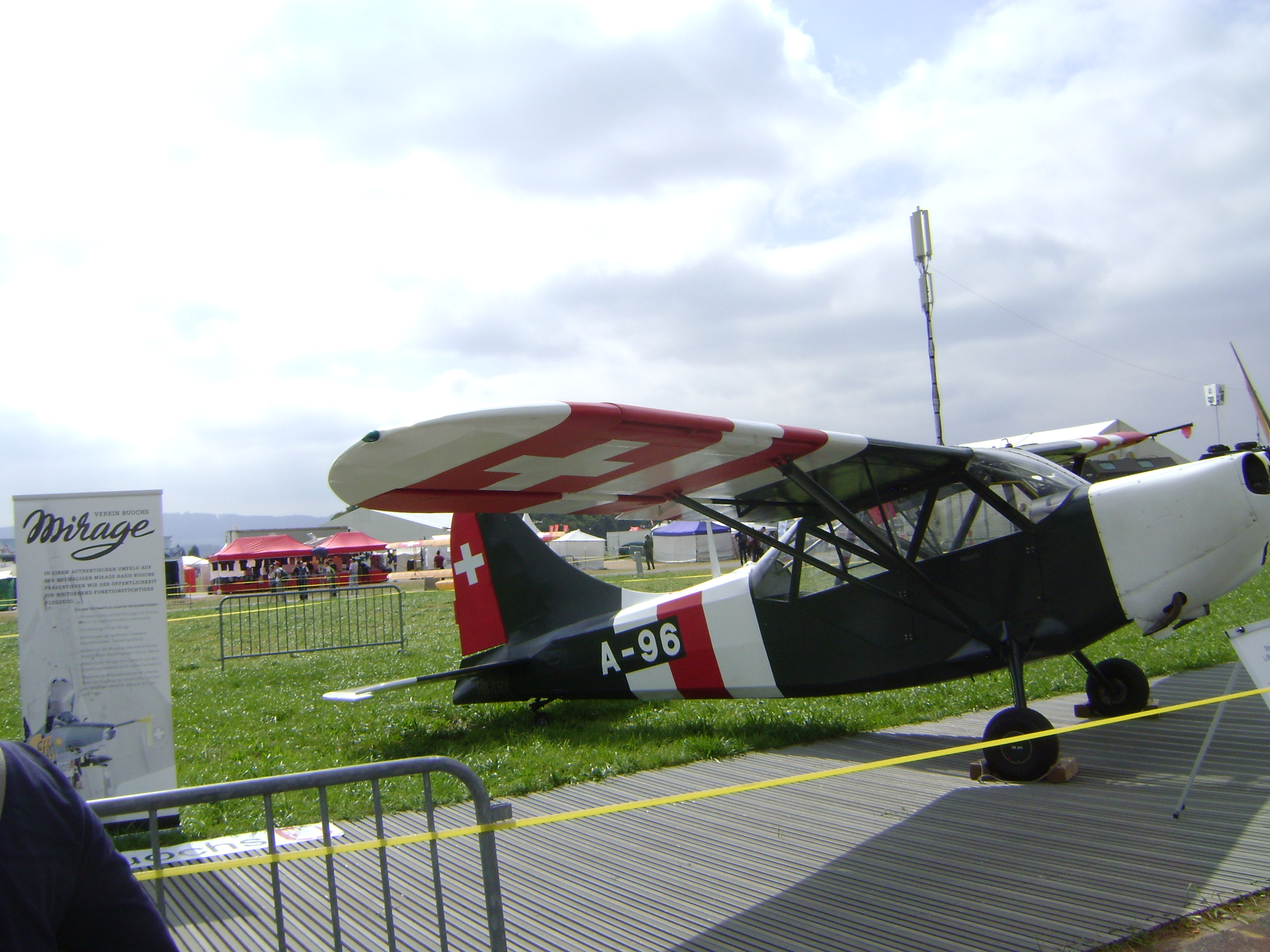 Stinson Sentinel